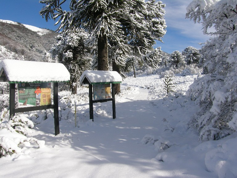 Acceso hacia el volcán Lonquimay, en Malalcahuello, Chile. Invierno de 2011 (fotografía por Leonardo Araya)